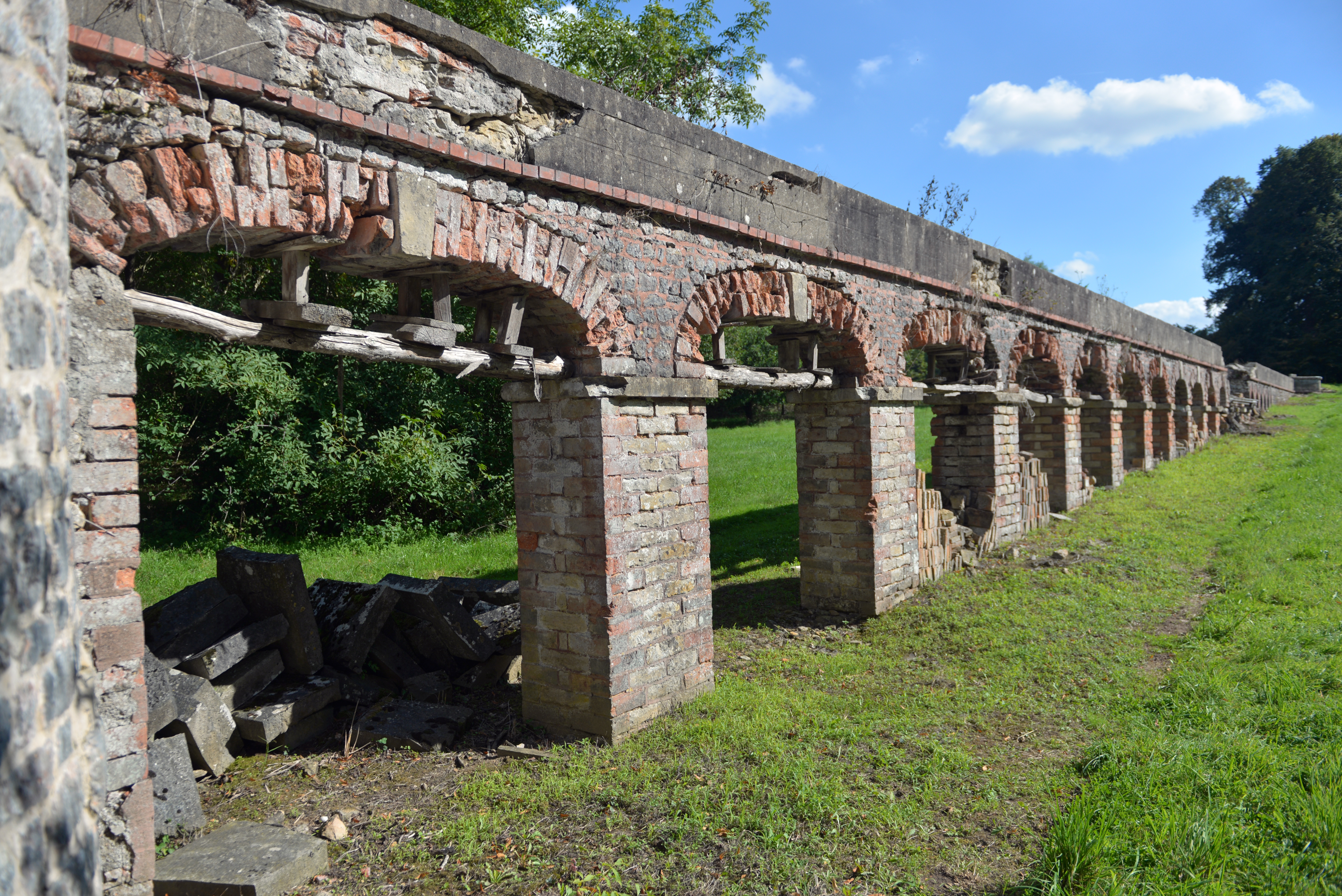 Aqueduc du Château de Dobert, Avoise, Sarthe, 2015.